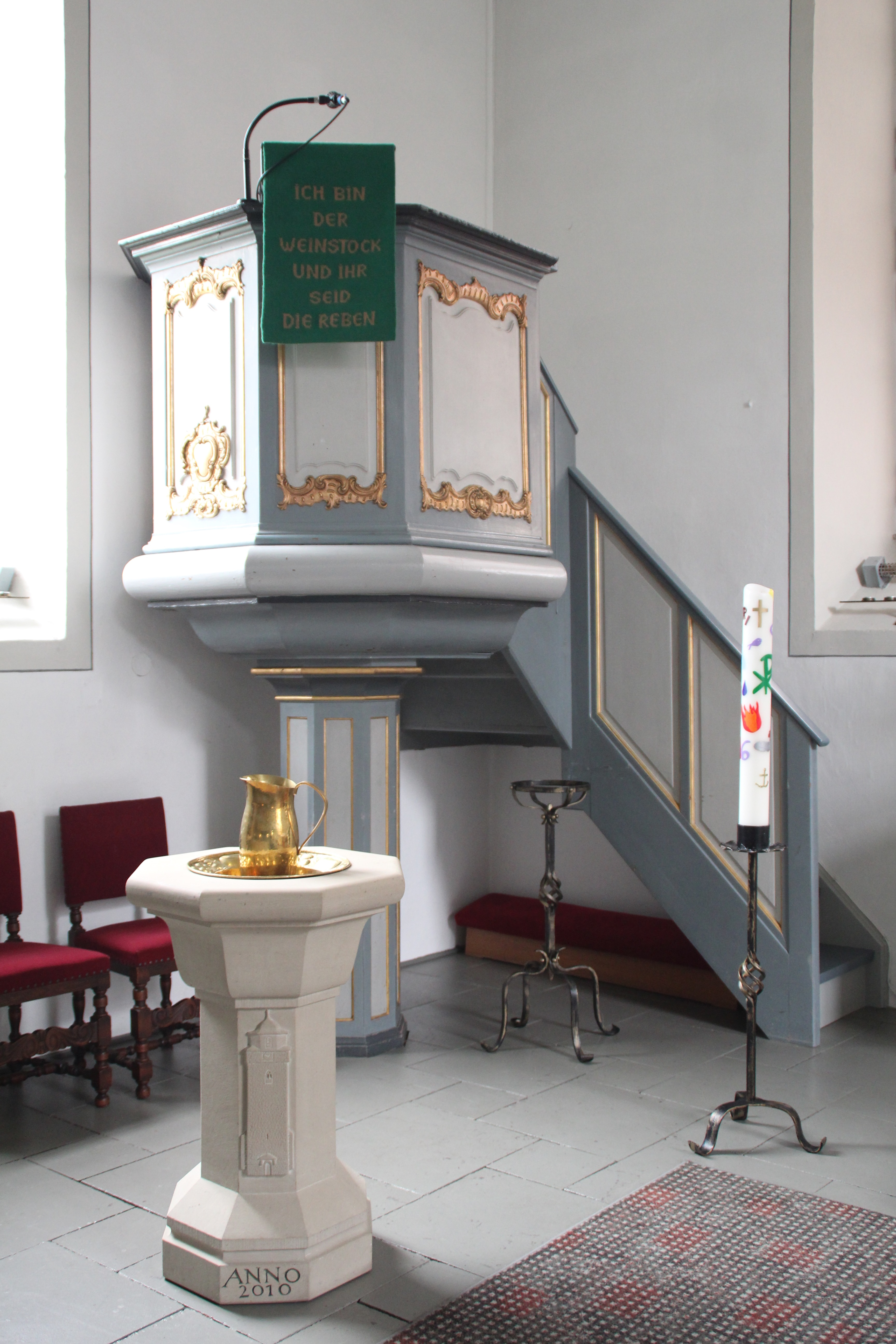 Kanzel, Taufstein und Osterkerze der Evangelischen Martinskirche zu Marburg-Wehrda